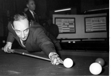 Jean Galmiche billard